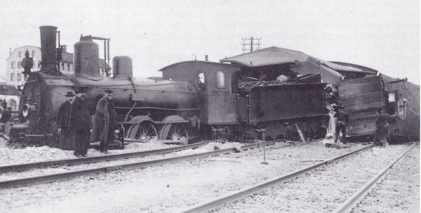 Entgleisung der Lok 1536 der bayerischen Gattung C IV (spätere 53 8155) im Rangierbahnhof München-Laim.